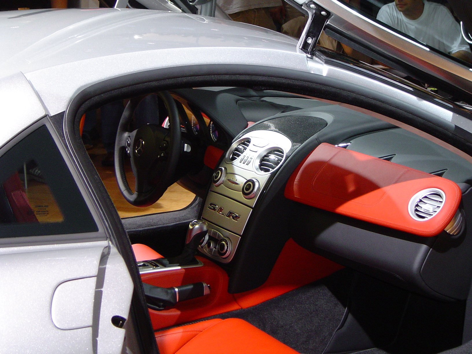 Mercedes Benz - SLR